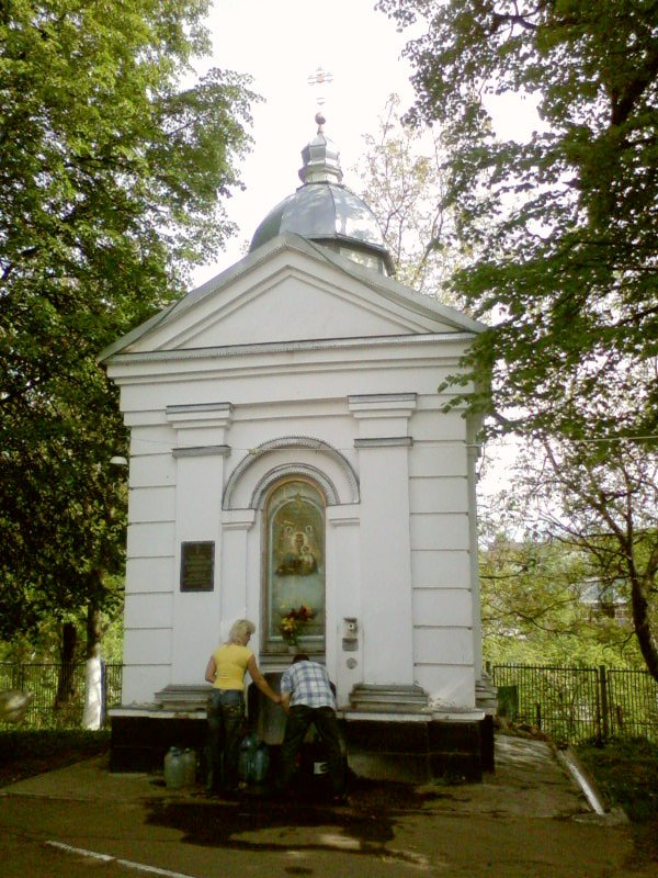 Каплиця над джерелом на території Миколаївської церкви у Василькові